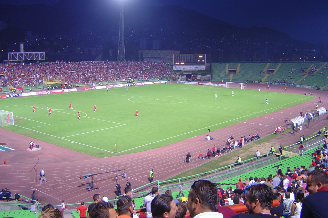 Asim Ferhatović Hase Stadium, Sarajevo, Bosnia. The largest stadium in BiH.